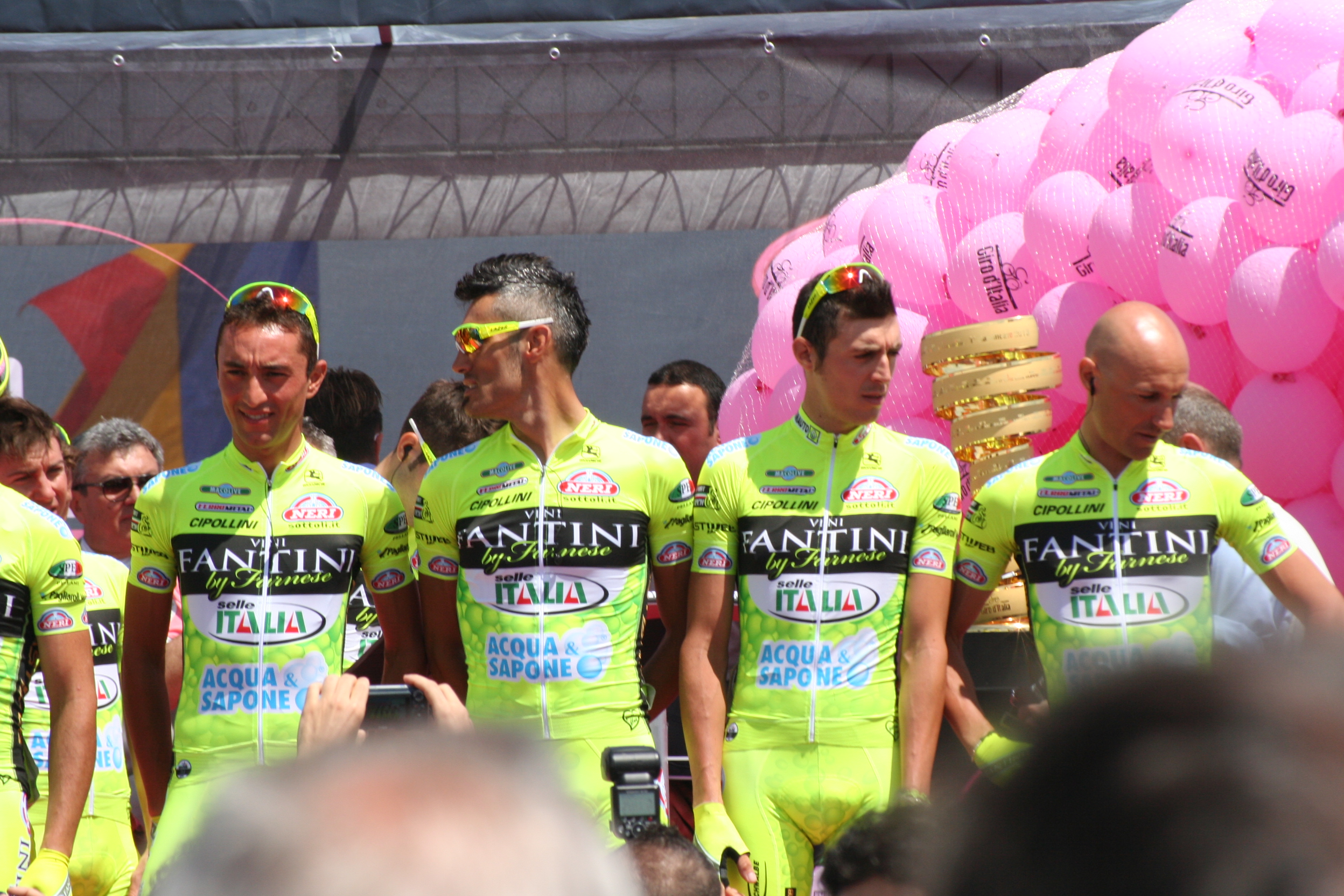 immagini dalla partenza della 7a tappa Giro 2013 (San Salvo Marina)